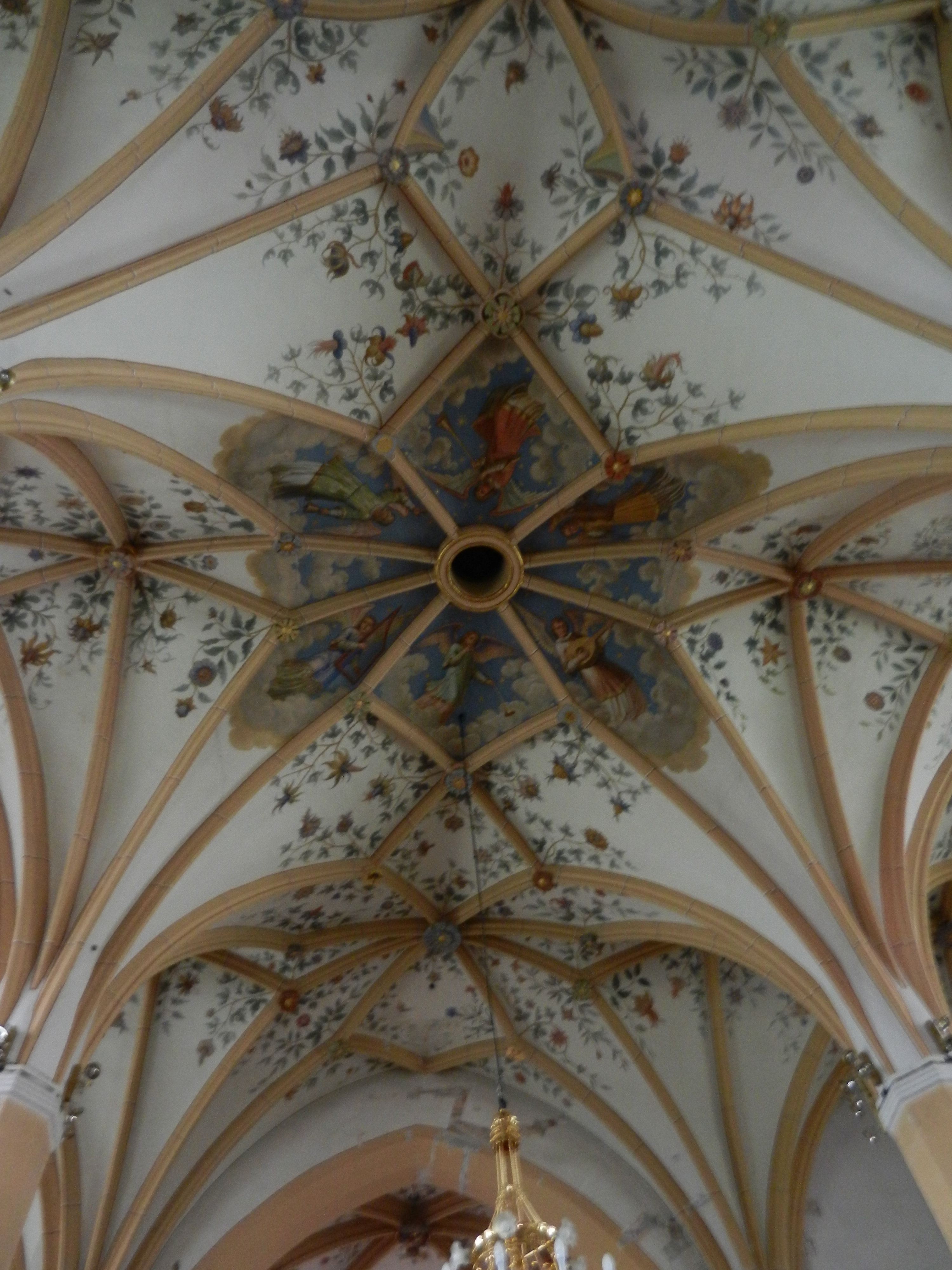 Strop v cerkvi svetega Petra v Radovljici, Slovenija.